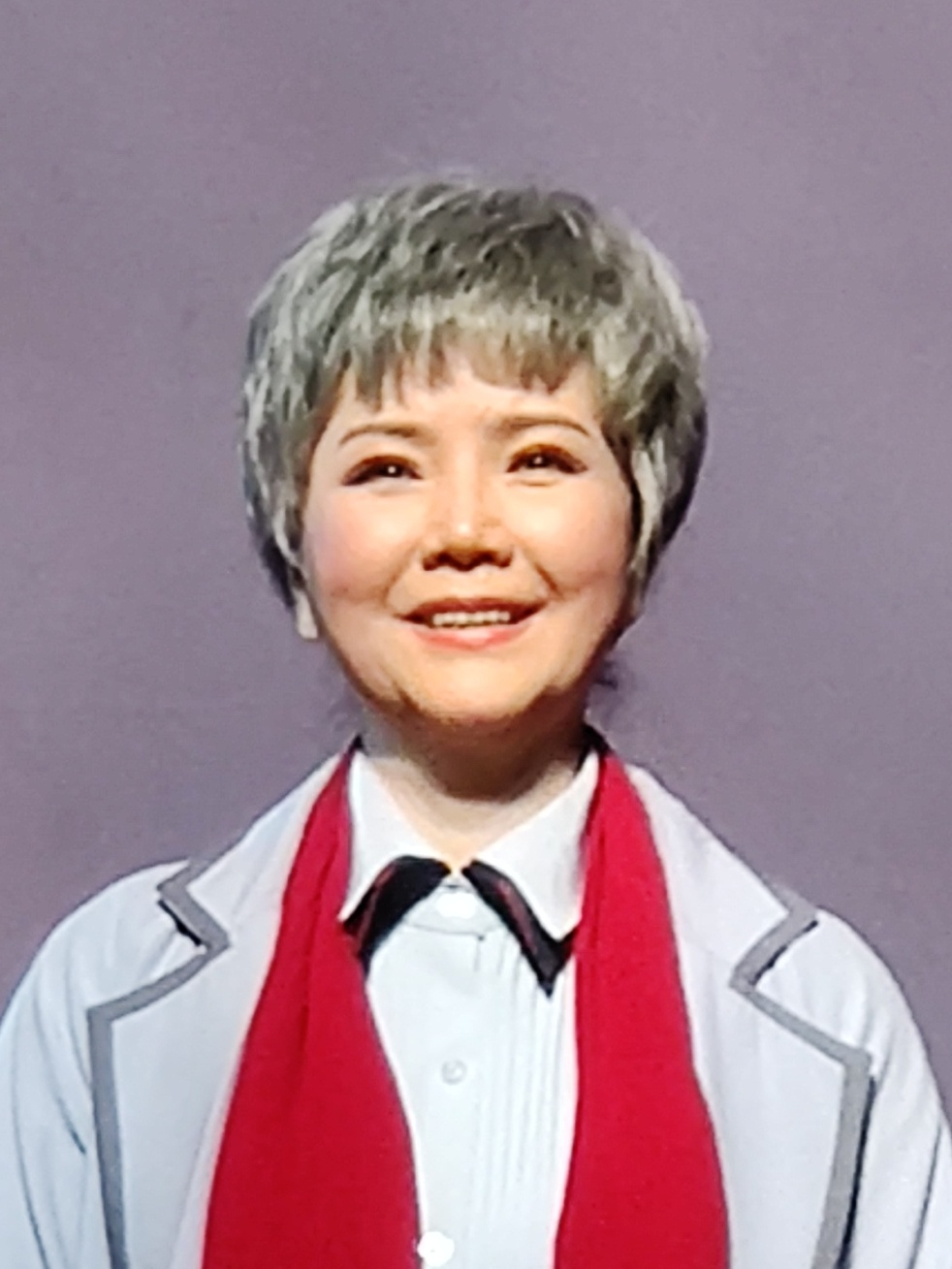 中文（中国大陆）: 茅善玉 一级演员 梅花奖得主